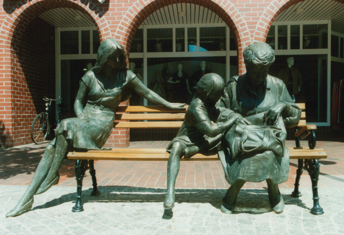 Die Bronze-Gruppe Drei Generationen von Bildhauer Carsten Eggers steht im Rotenburger Ortskern